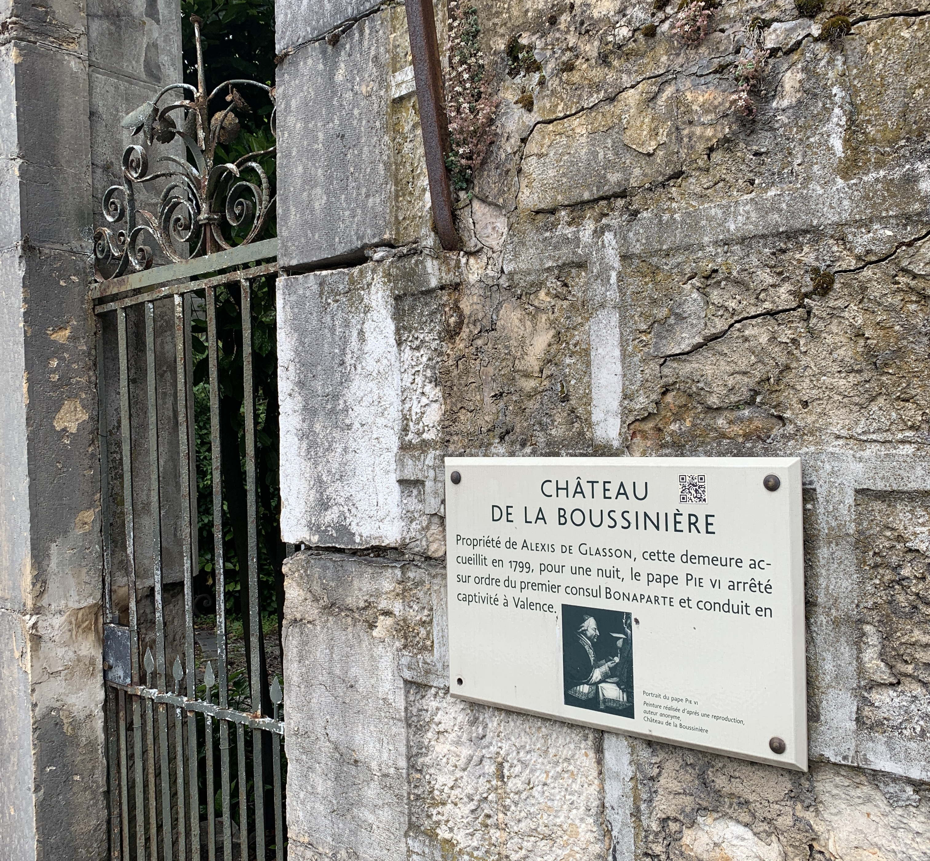 Plaque Château de La Boussinière - Tullins